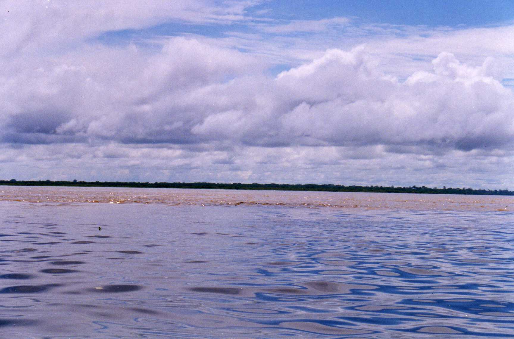 El rio Nanay (negro) encontrándose con el Amazonas (color rubio), un fenómeno que ocurre en el norte de Iquitos.